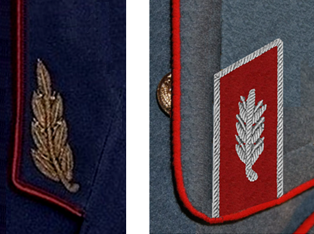 Петлицы1960